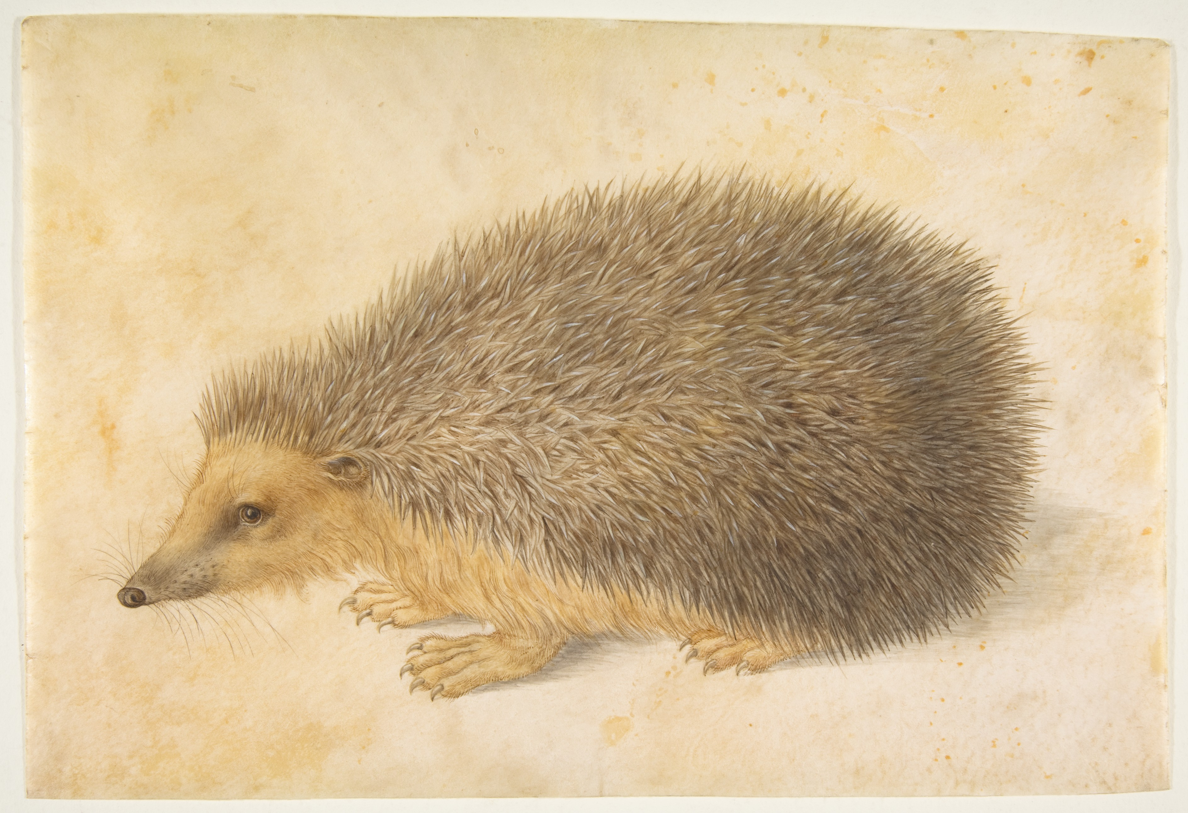 Drawing; Drawings